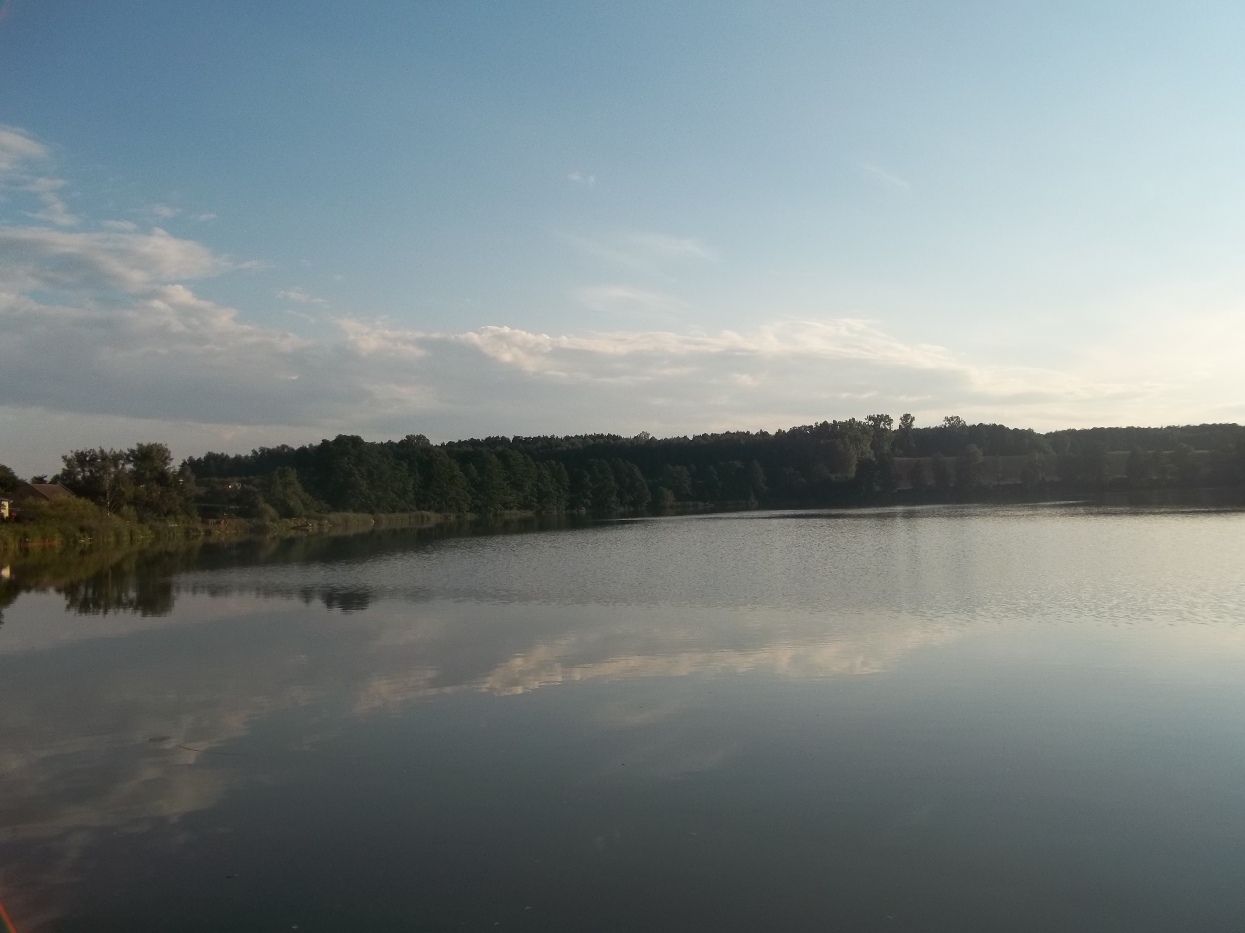 Jezioro Wielkie, Góra, wschodni brzeg